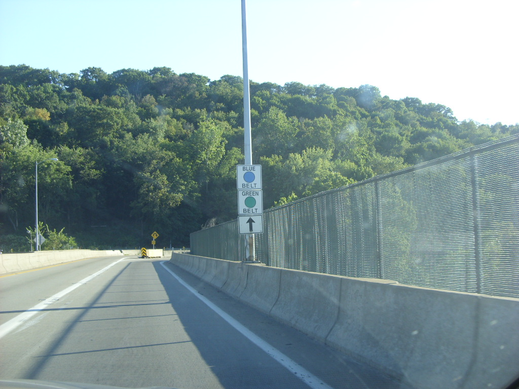 Pittsburgh, Pennsylvania